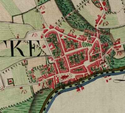 Detail van de Ferrariskaart van Wervik uit de jaren 1770.